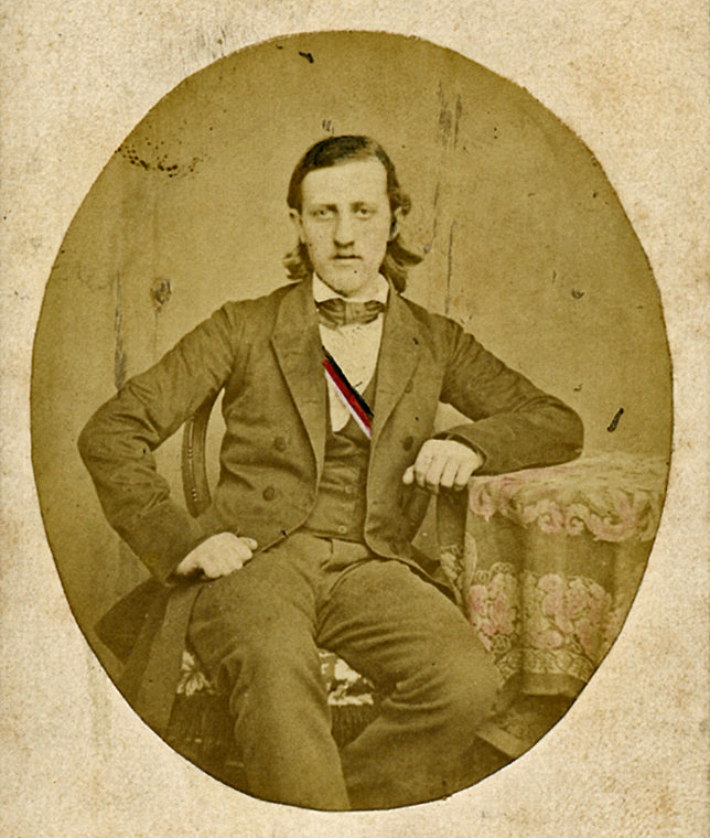 Ludwig Bickell als Student mit Gehrock und den urprünglichen Farben der von ihm 1860 in Marburg mitgegründeten Burschenschaft Arminia (nachkoloriert).